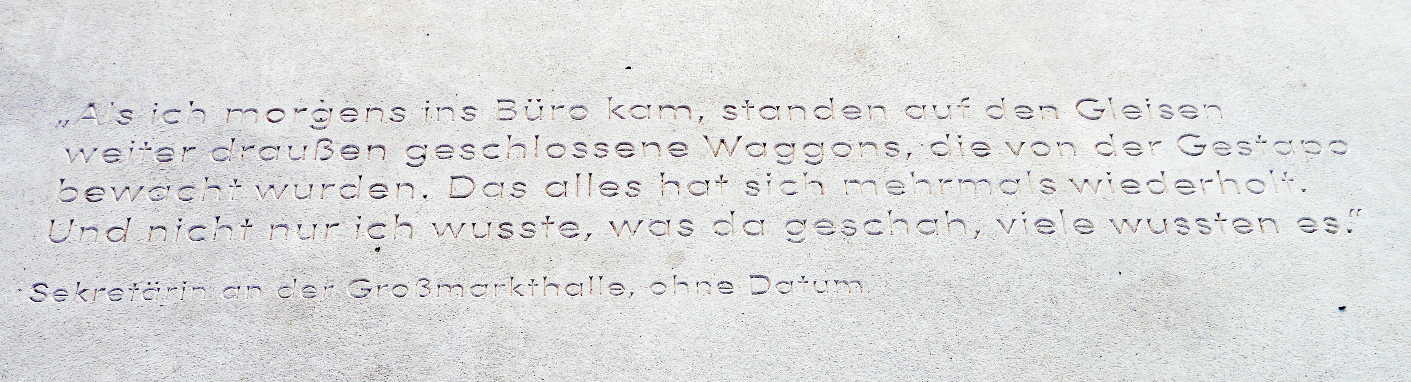 Zitat einer zu dieser Zeit an der Großmarkthalle beschäftigten Sekretärin und Zeugin der Deportationen von hier. Zitatenreihe auf dem Fußweg von der Hanauer Landstraße zur Gedenkstätte an der Großmarkthalle in Frankfurt am Main.